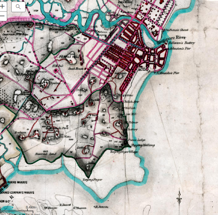 Telok Ayer Basin 1860